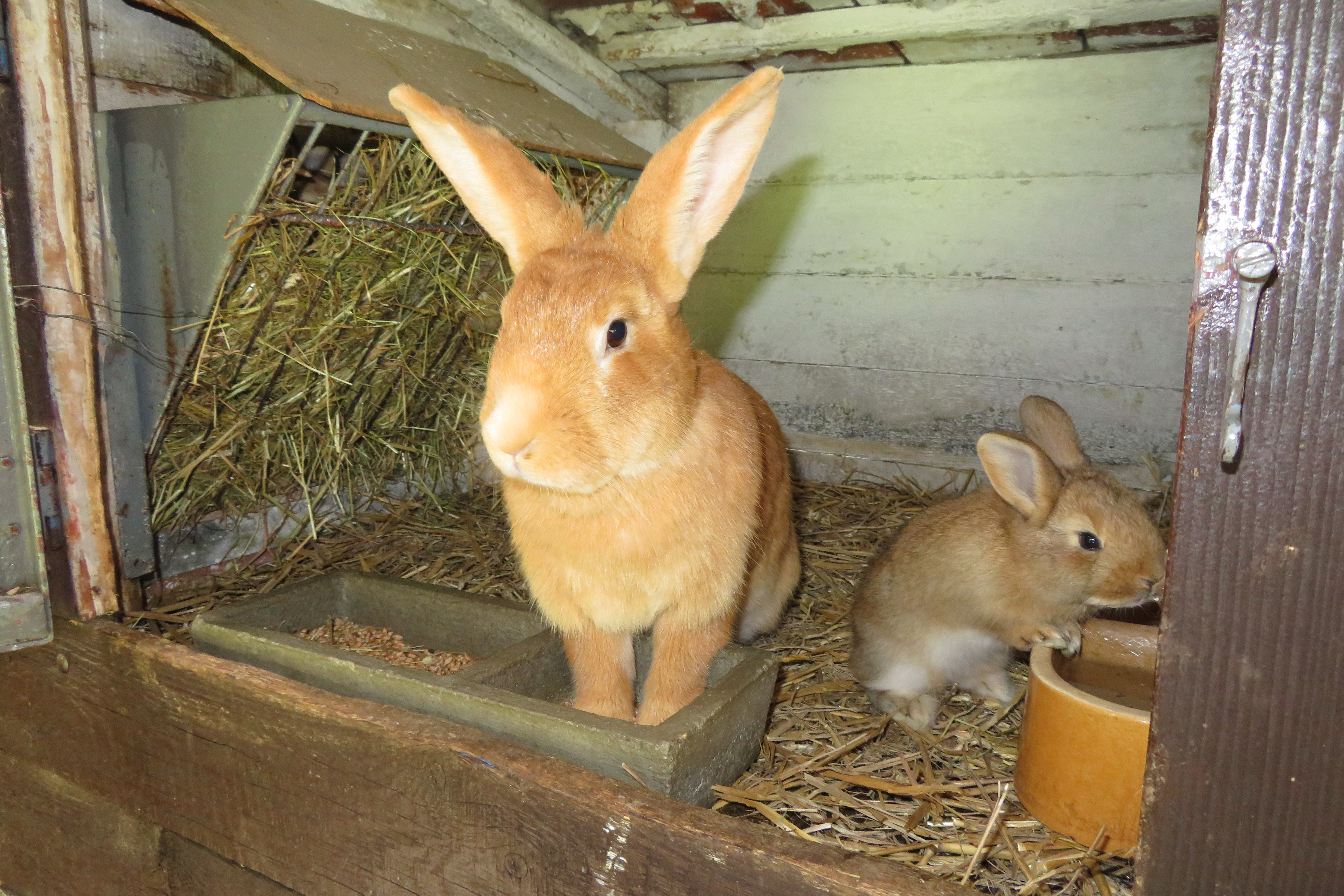 Burgundský králík